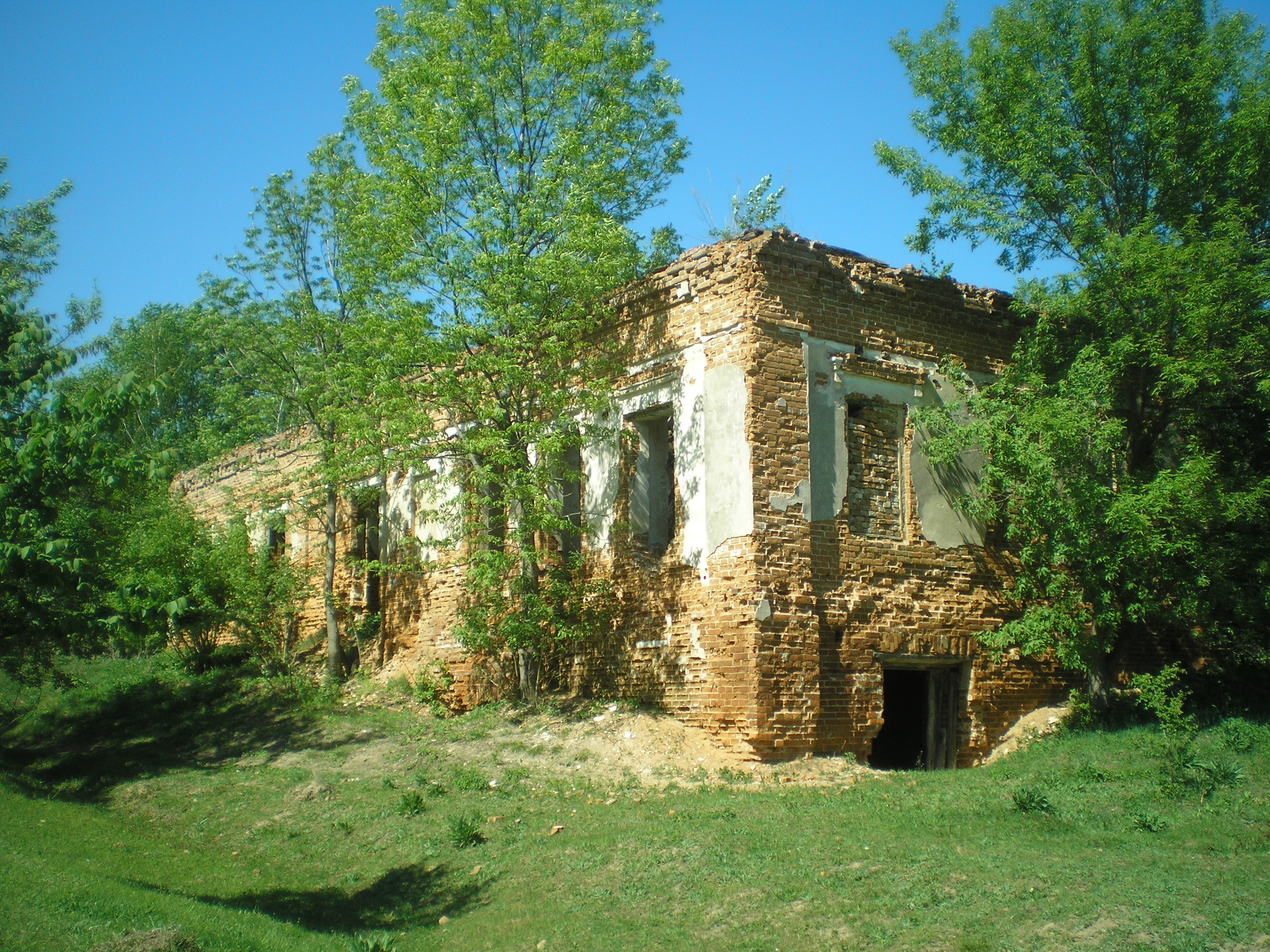 Руїни Рихлівського монастиря